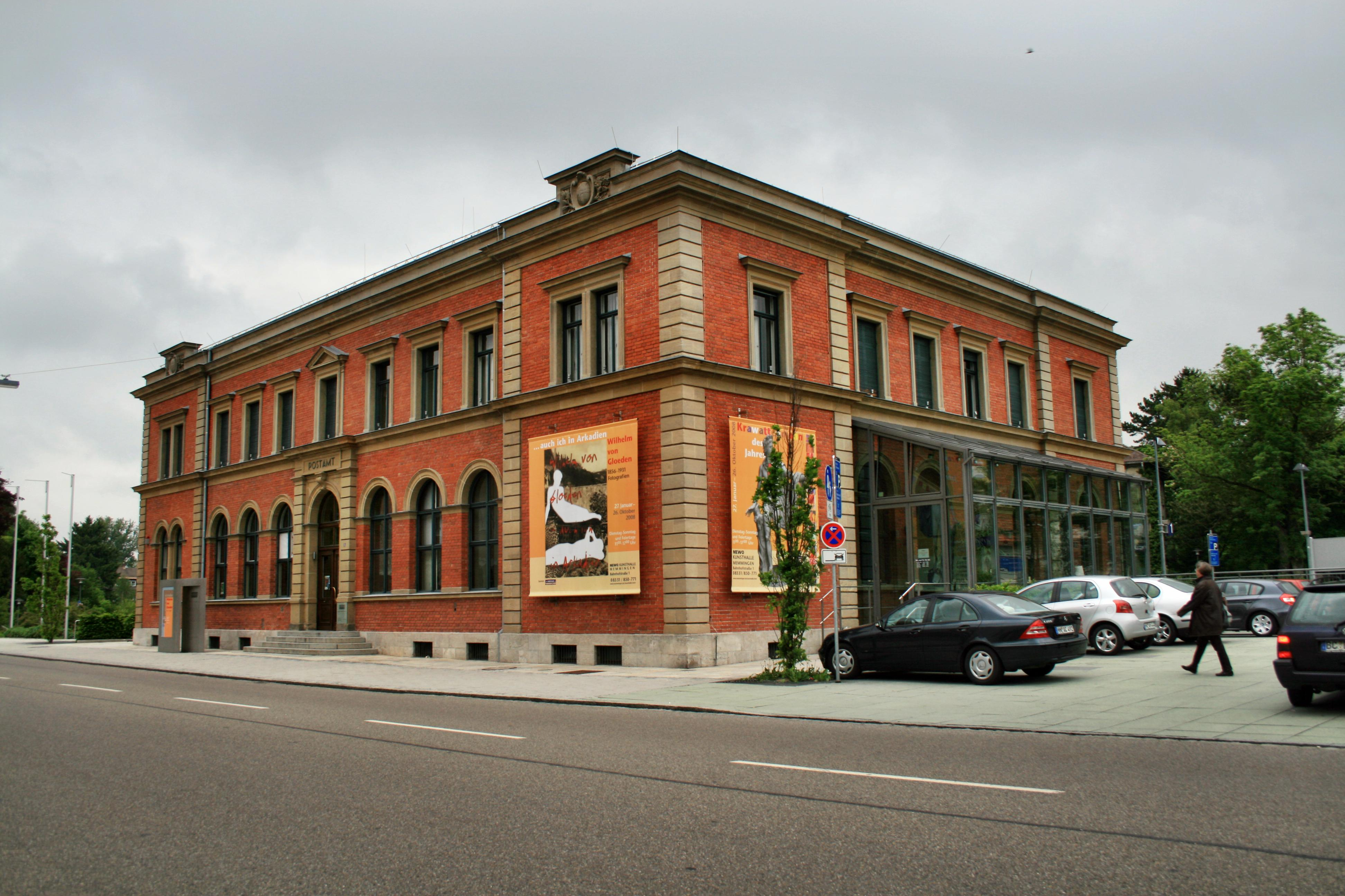 Die MeWo-Kunsthalle in Memmingen in den Räumen der alten Post